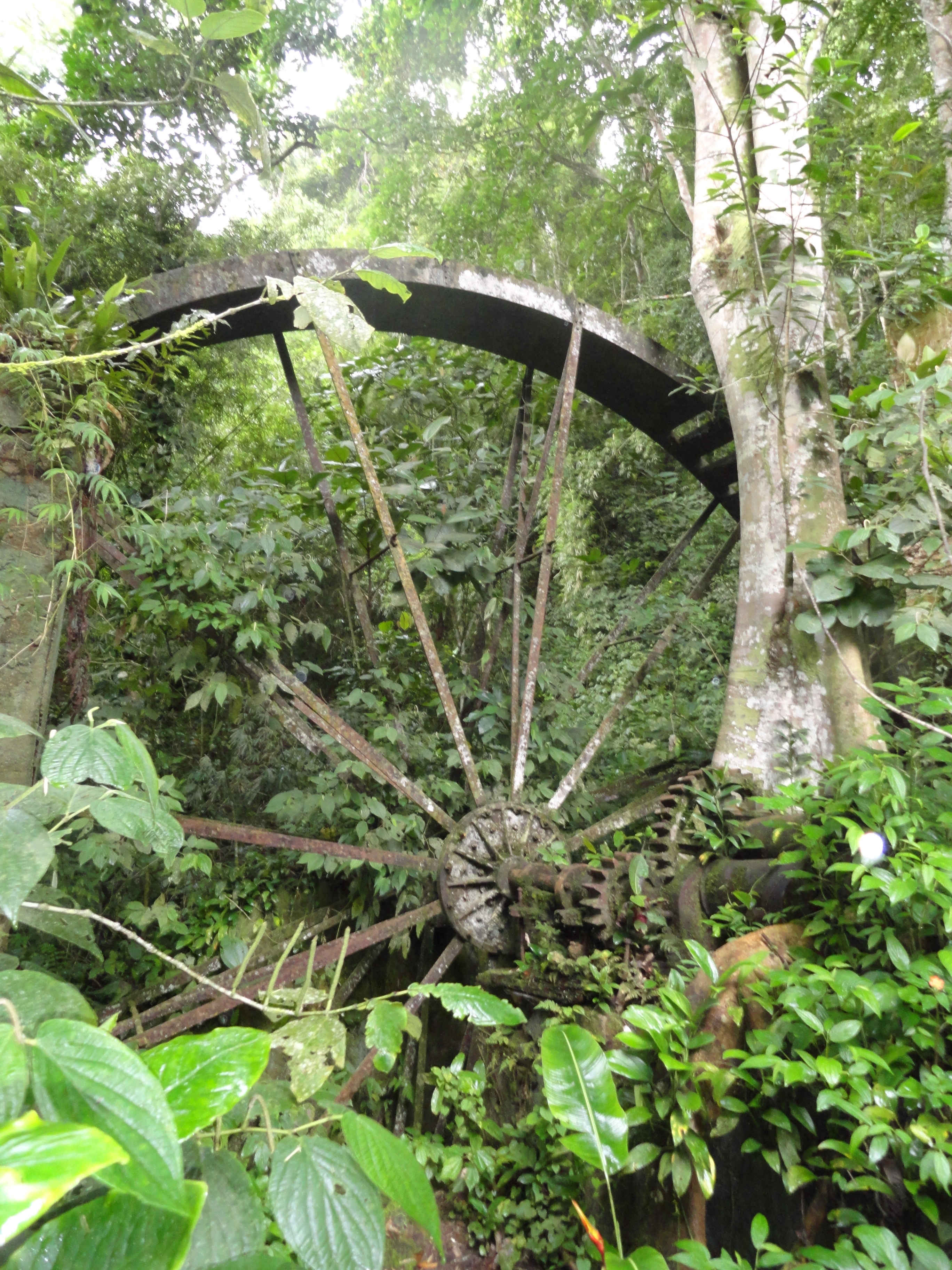 old Sugarmill outside Parat